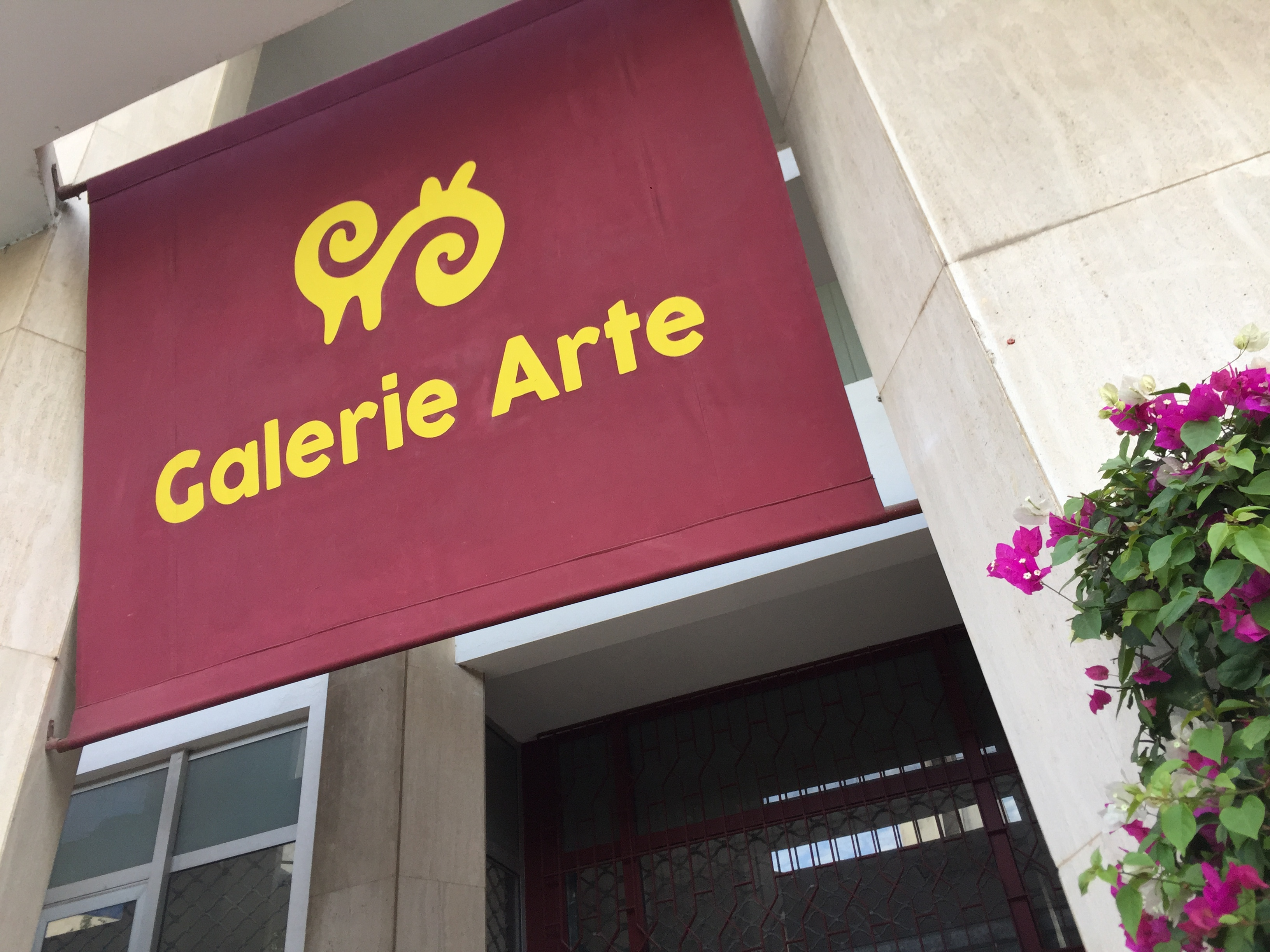 Extérieure de la Galerie Arte de Dakar.